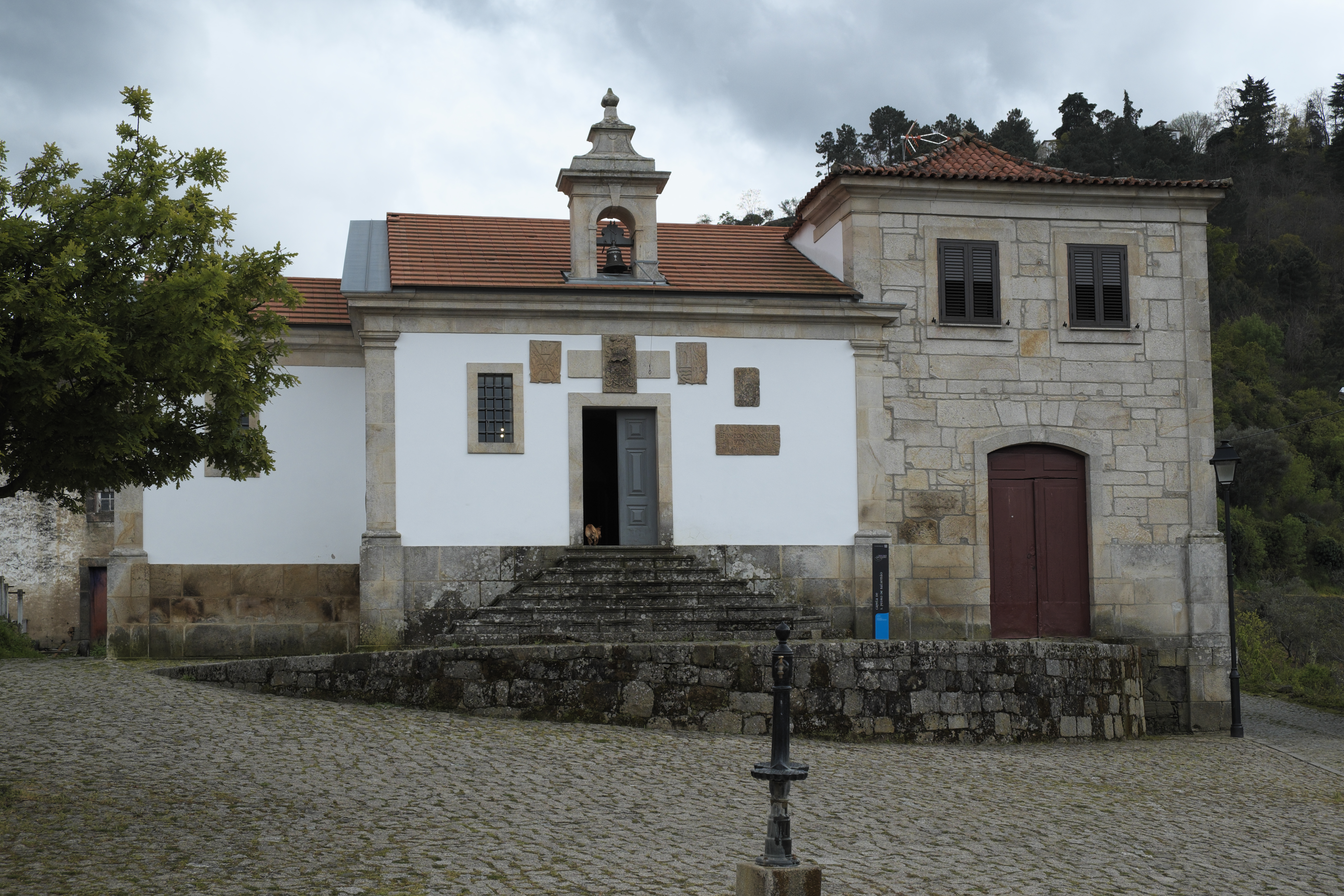 Präromanische Kirche São Pedro in Balsemão, einem zur Stadt Lamego gehörenden Ort im Distrikt Viseu in Nordportugal